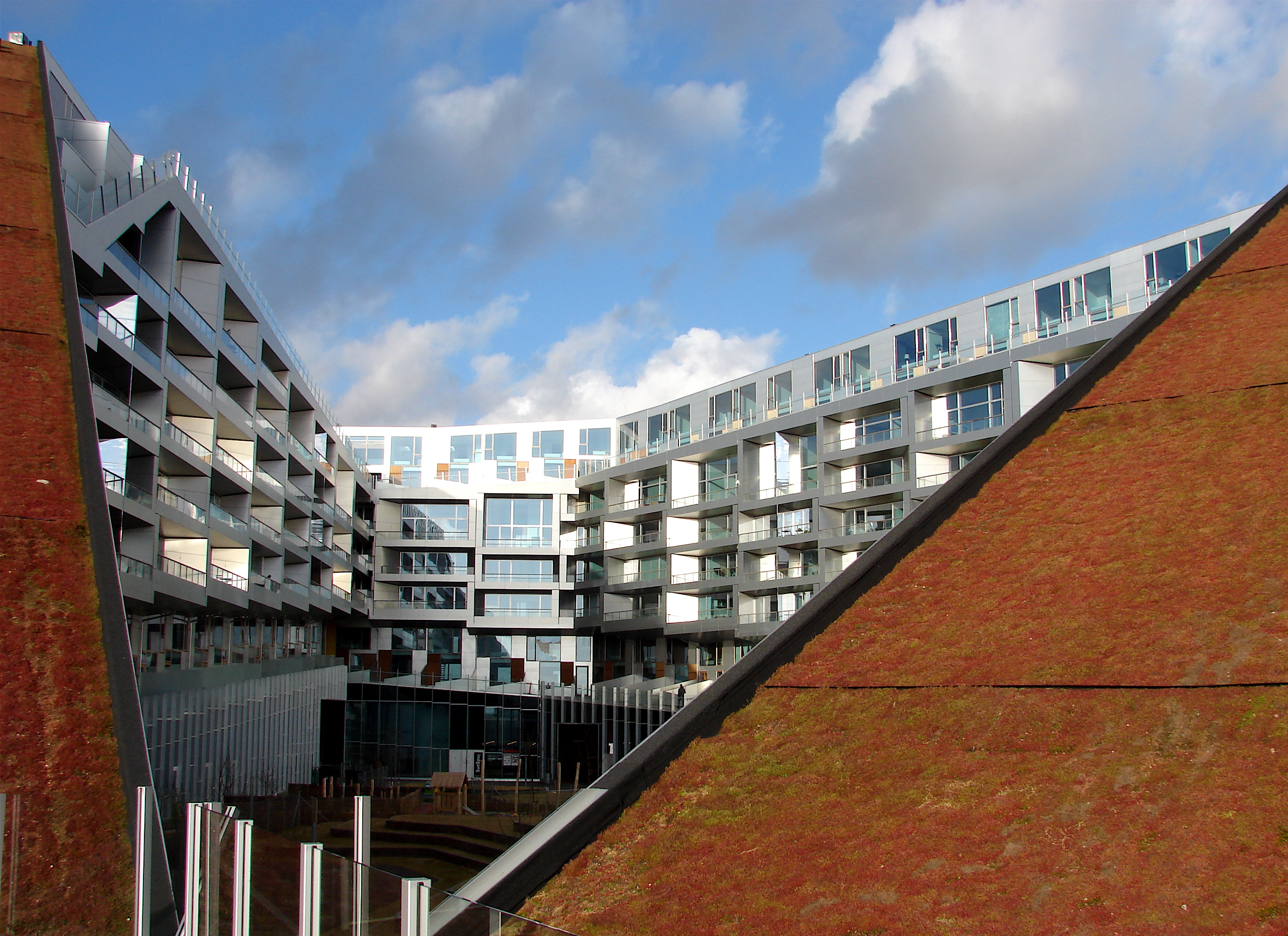 Ørestad Syd, 8-tallet, Vestamager, Amager